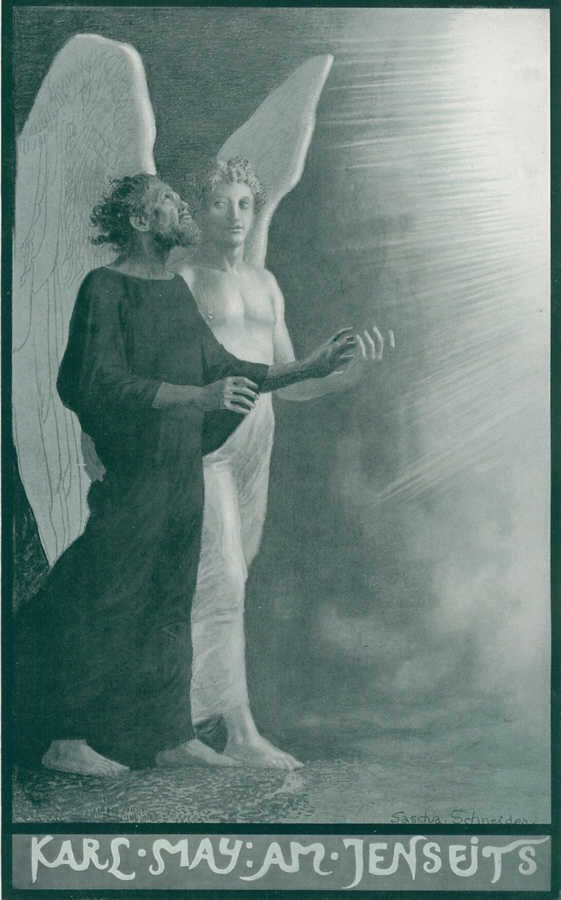 Buchdeckel des Romans Am Jenseits von Karl May. Ausgabe von 1906, gestaltet von Sascha Schneider.